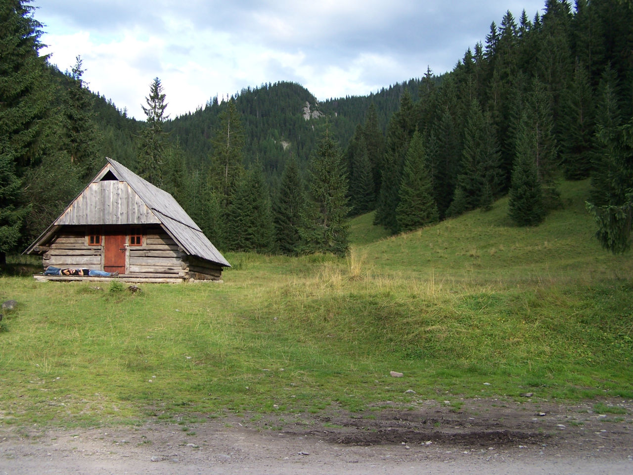 Polana Huciska (Dolina Chochołowska, Tatry)